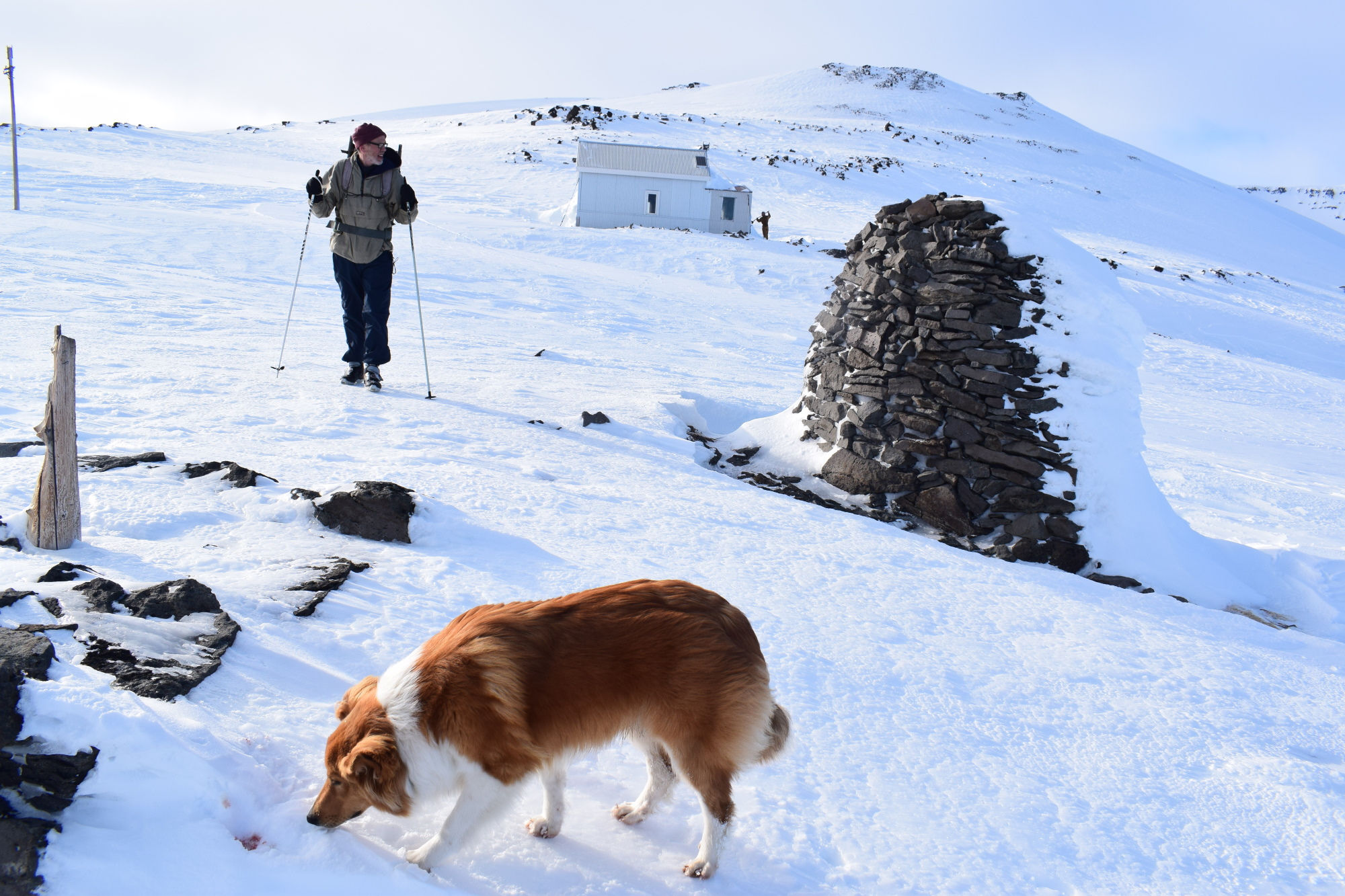 Heljuskáli er í eigu Ferðafélags Svarfdæla